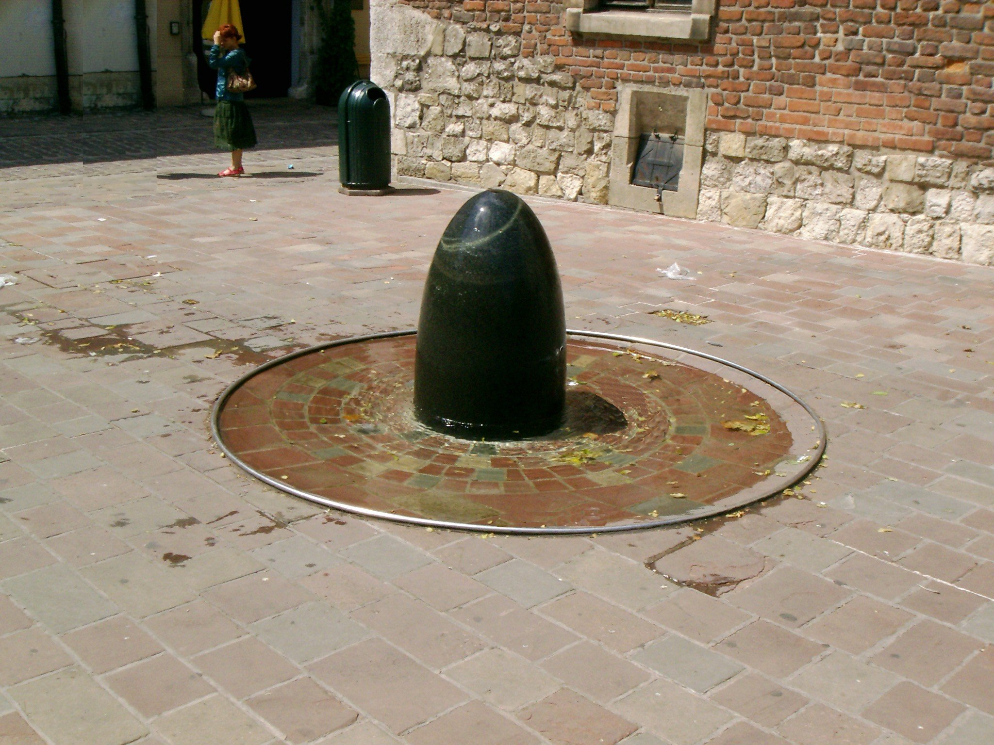 Ekologiczna fontanna. Kraków przy kolumnie Piotra Skargi